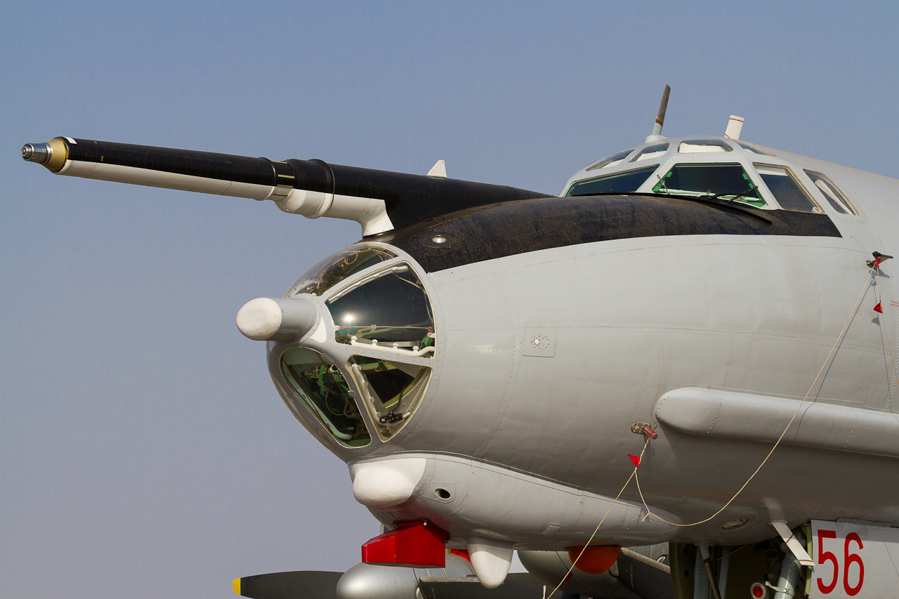 _MG_0043